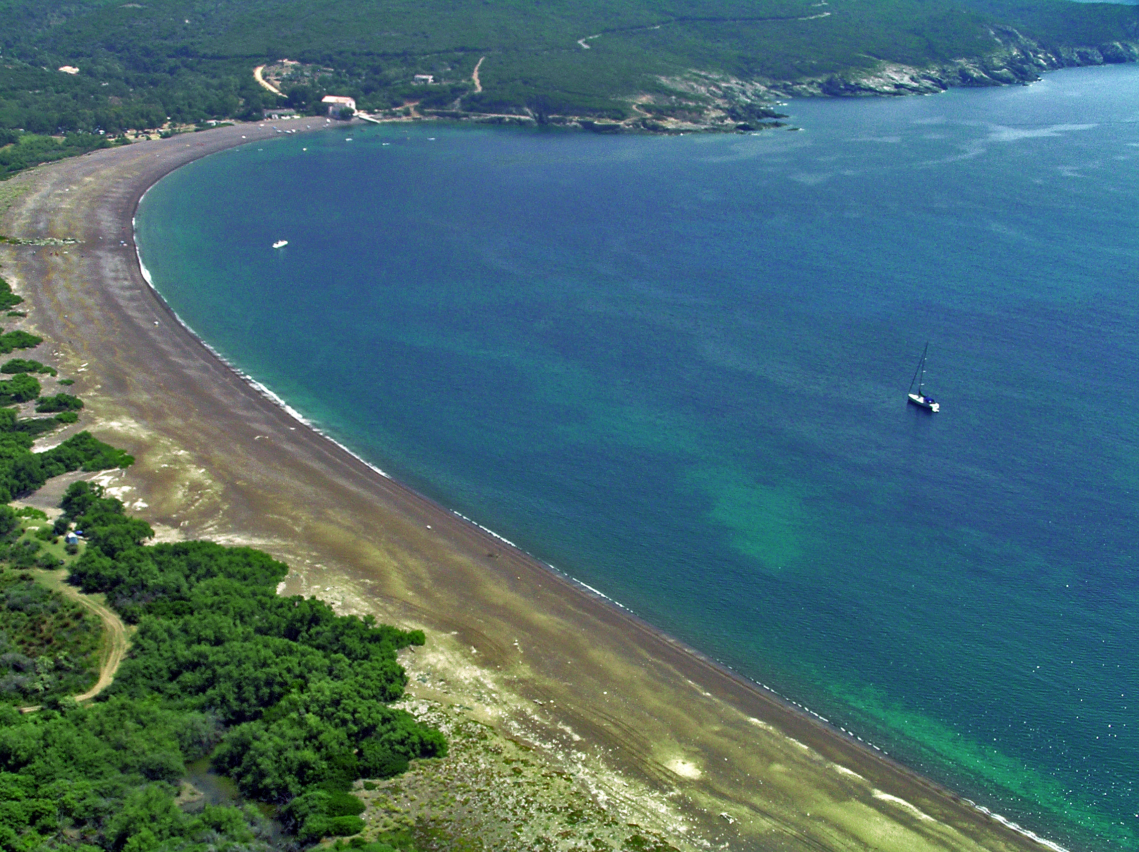 Calenzana - L'Argentella vue aérienne